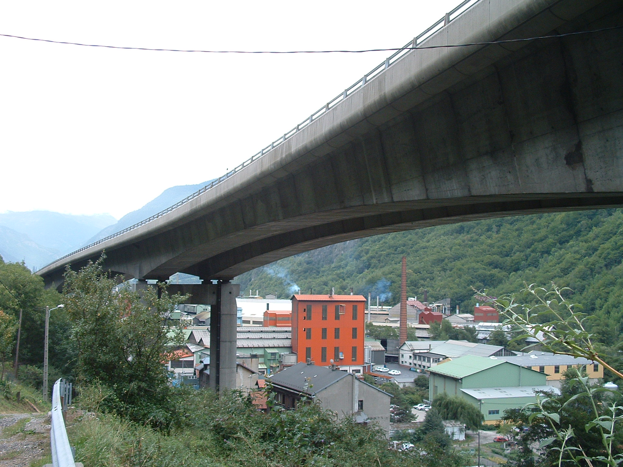 La Léchère - RN90 - Viaduc du Champ-du-Comte